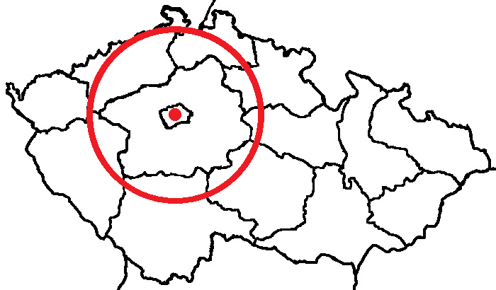 Velikostní porovnání planetky Chicxulub (červená tečka) a vzniklého kráteru (rudá kružnice) s Českou republikou.